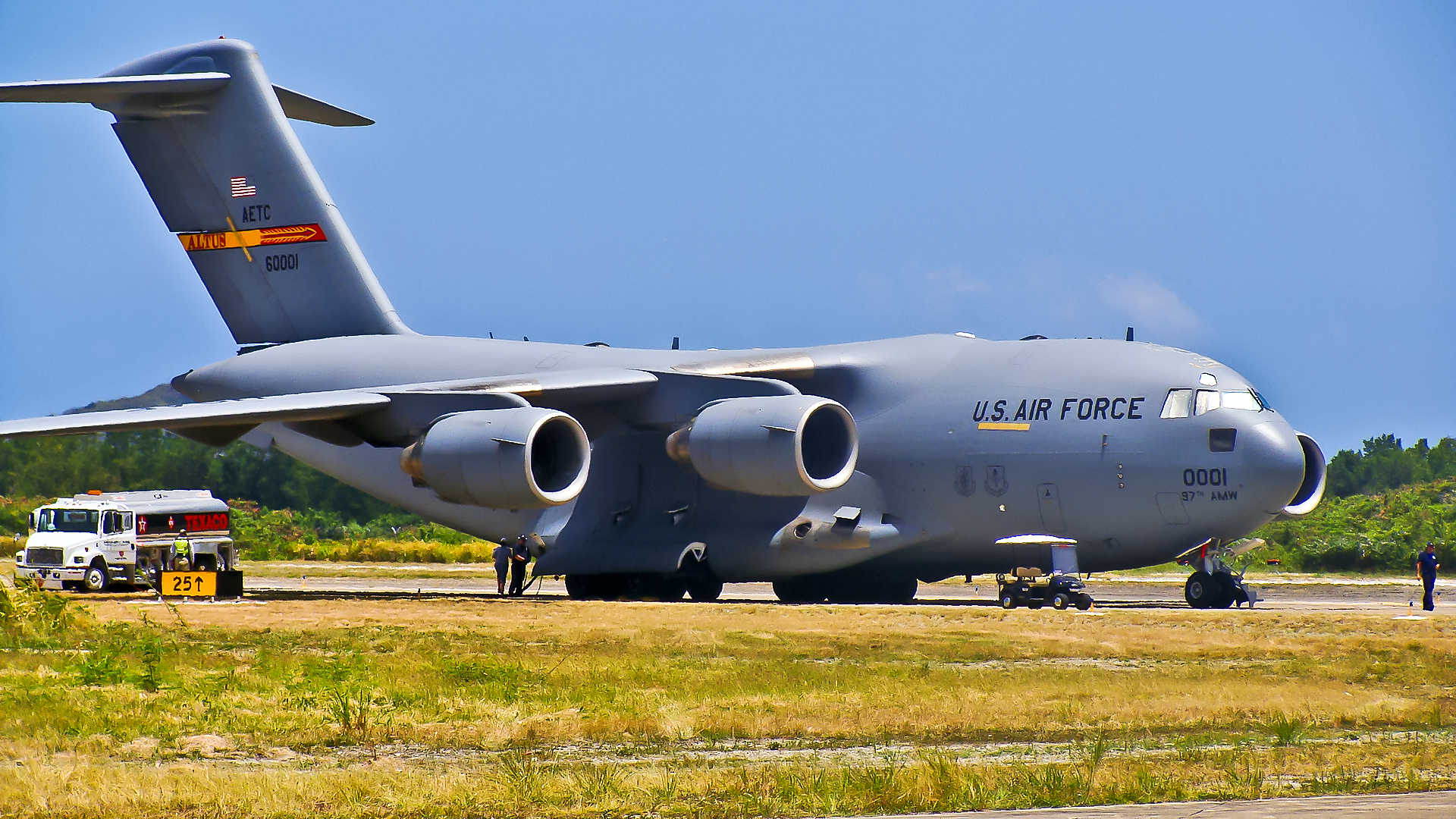 Puerto Rico Air Show April 18- 19 2009 Ceiba Airport, Puerto Rico Photo by Tomás Del Coro